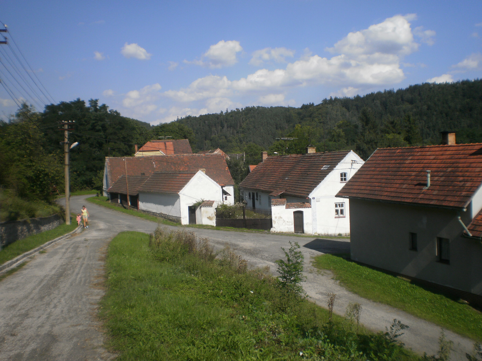 Náves v obci Rakolusky - horní pohled